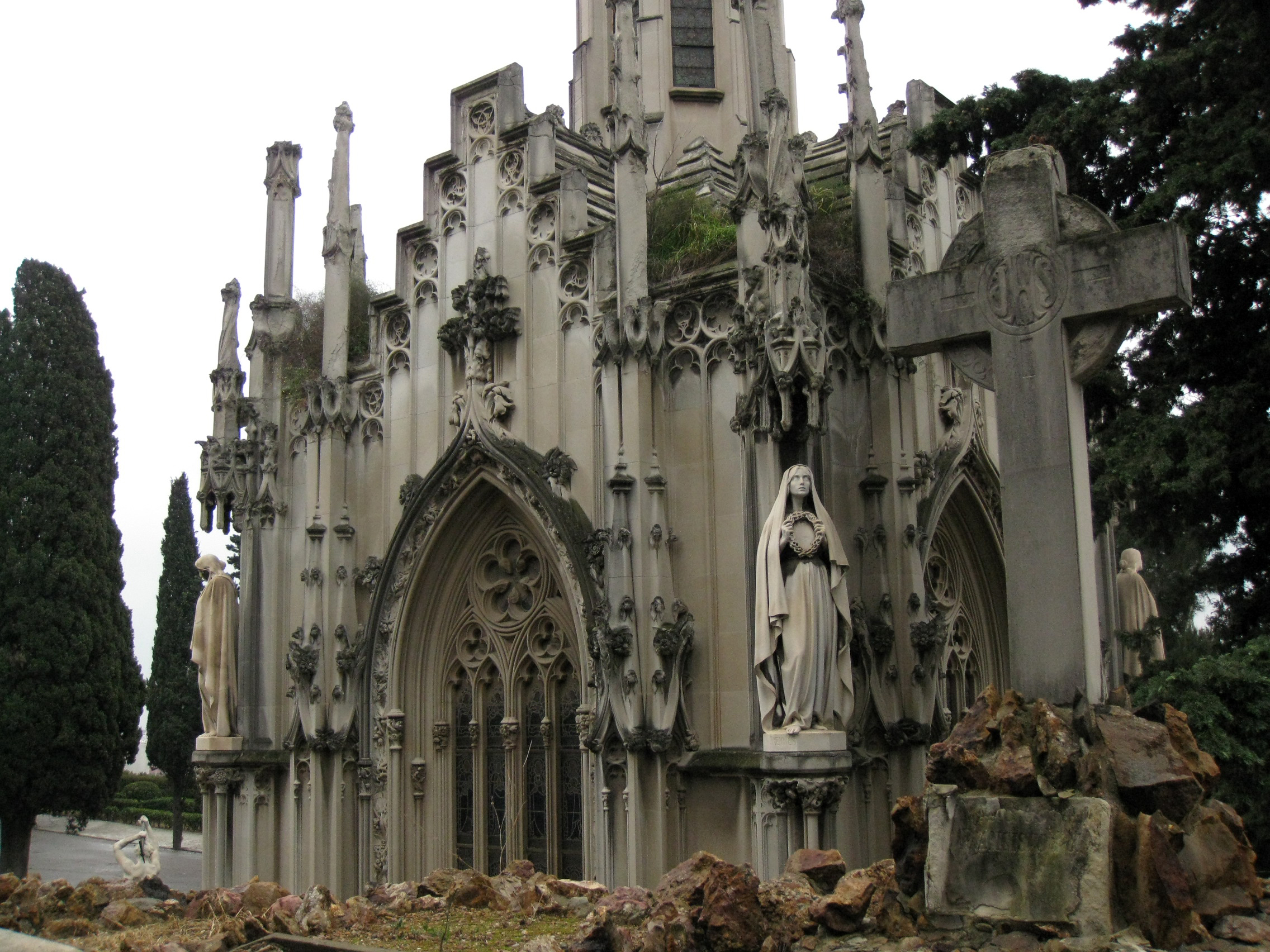 Cementiri de Montjuïc (Barcelona) Object location41° 21′ 12.8″ N, 2° 09′ 17.65″ E